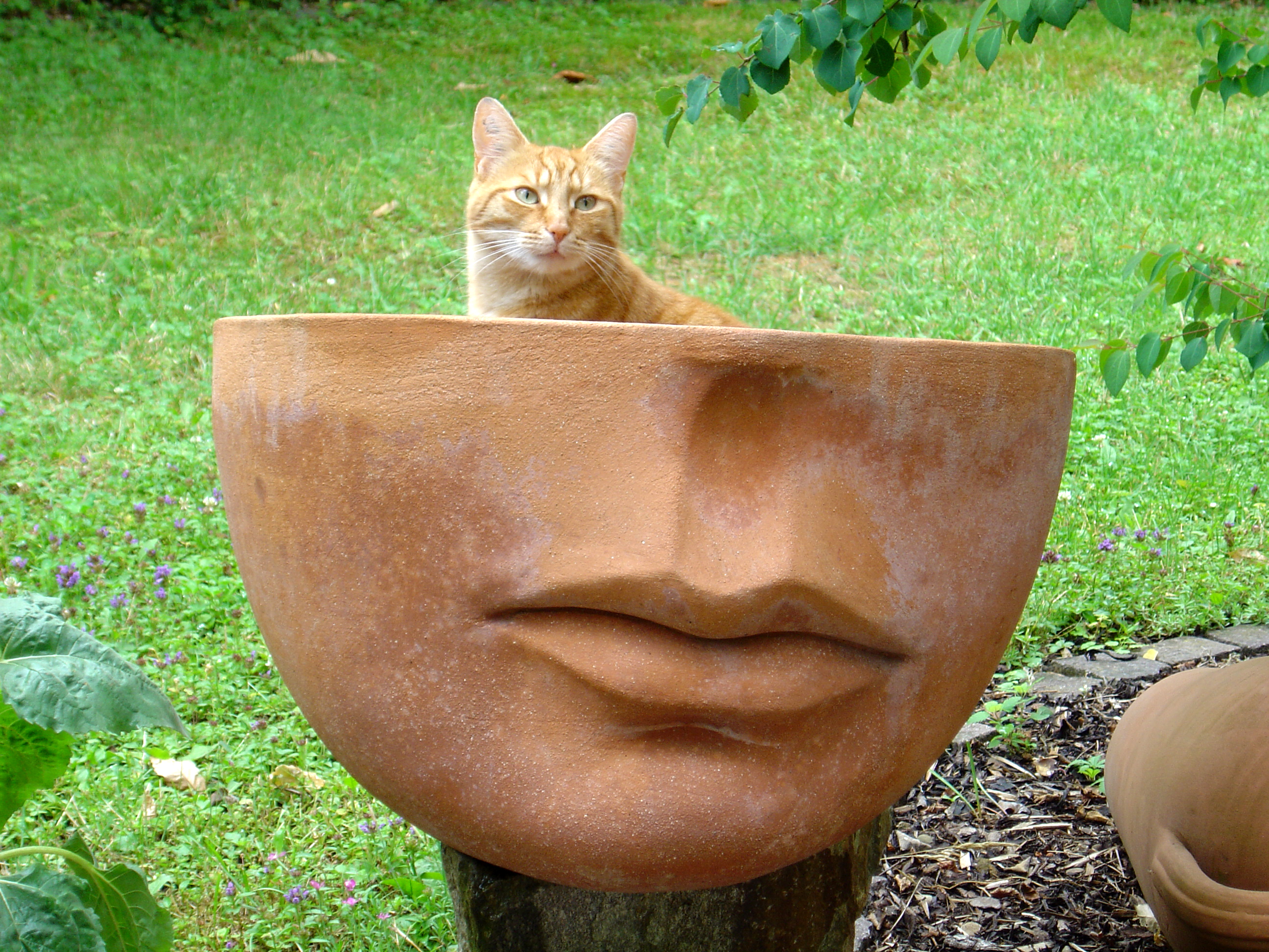 Hauskatze